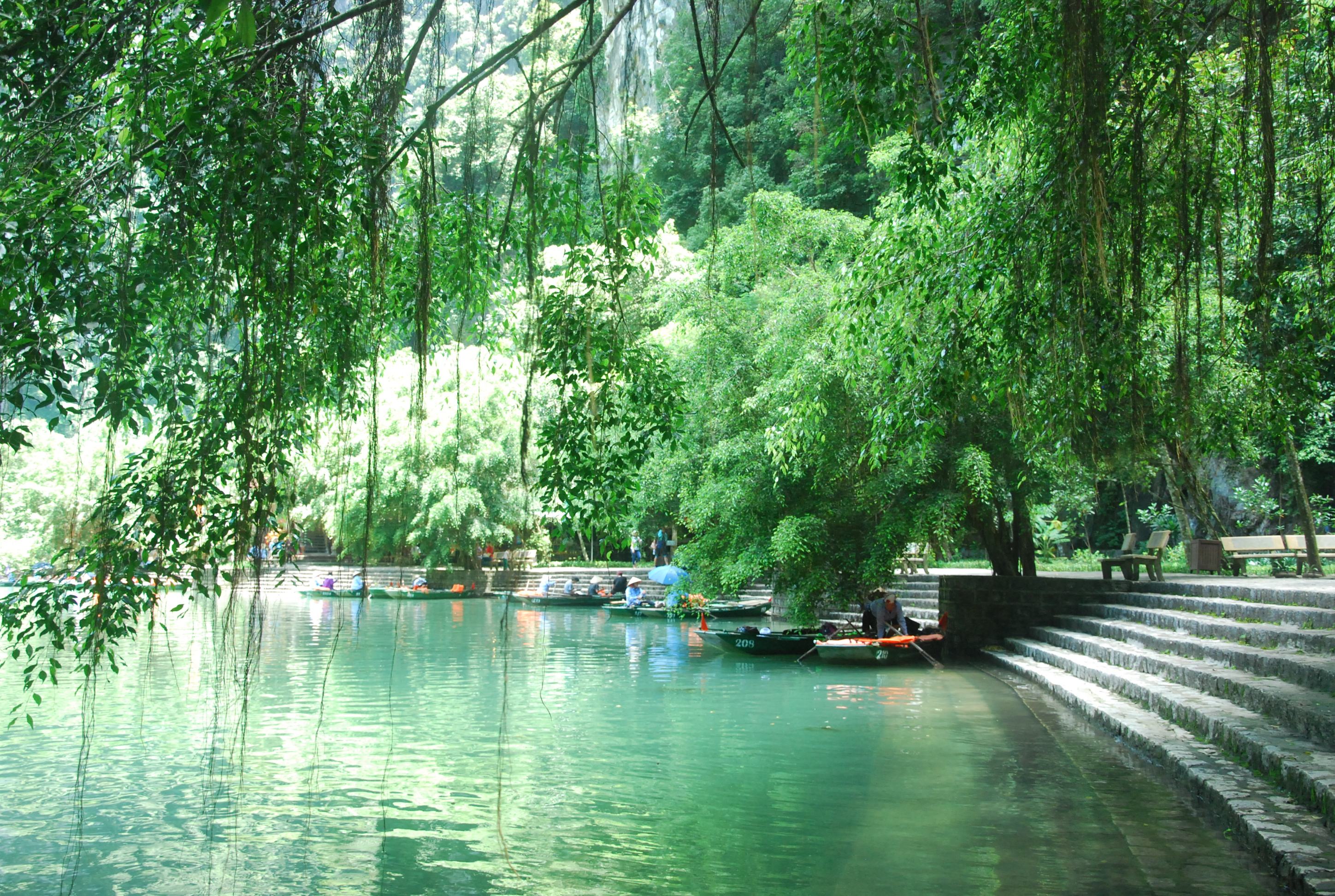 Phong cảnh khu du lịch sinh thái Tràng An ở Ninh Bình